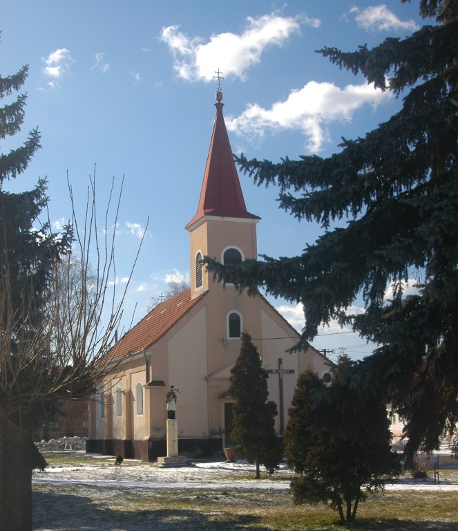 Vrádište, church